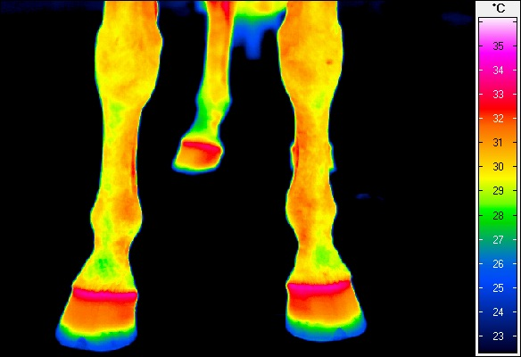 Termogram kopyt konia